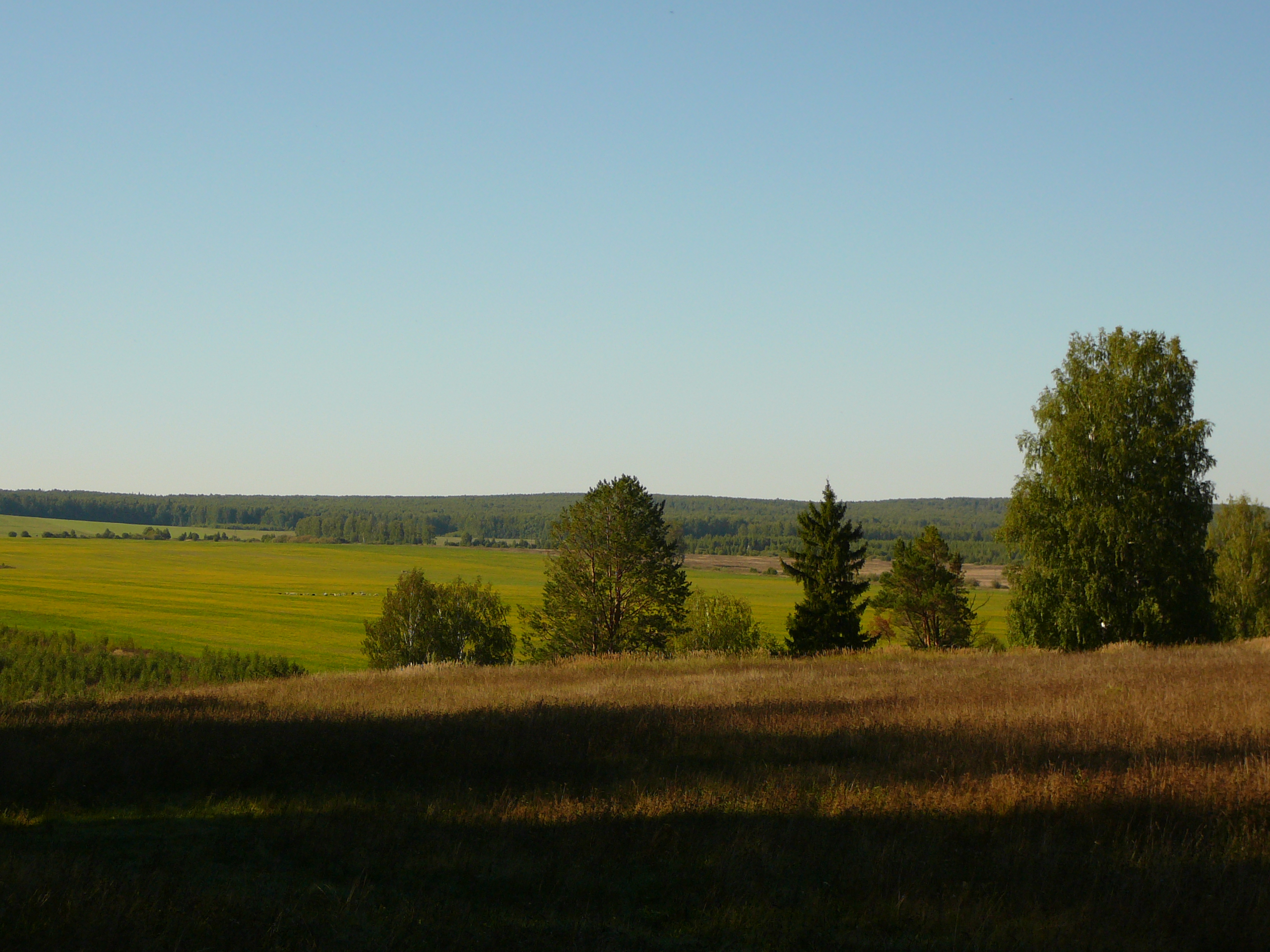 Порек, поля